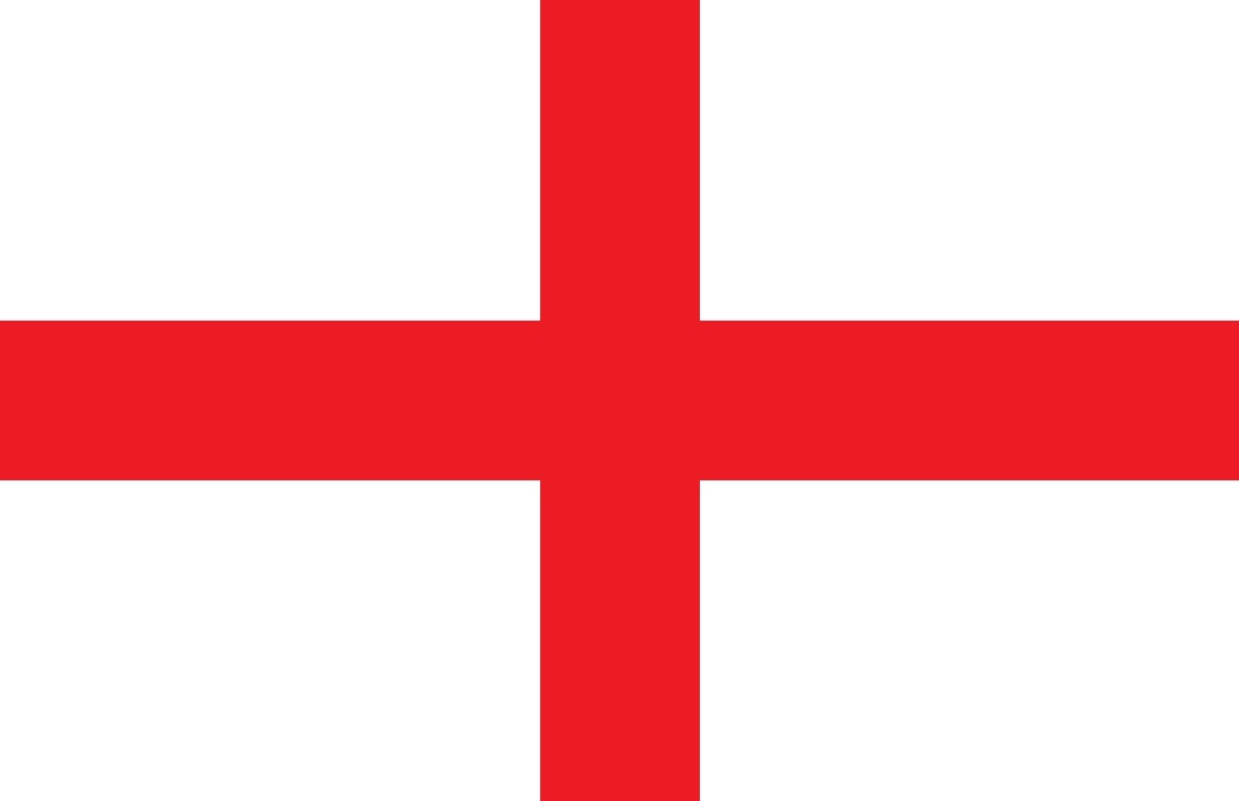 Bandiera di Varese